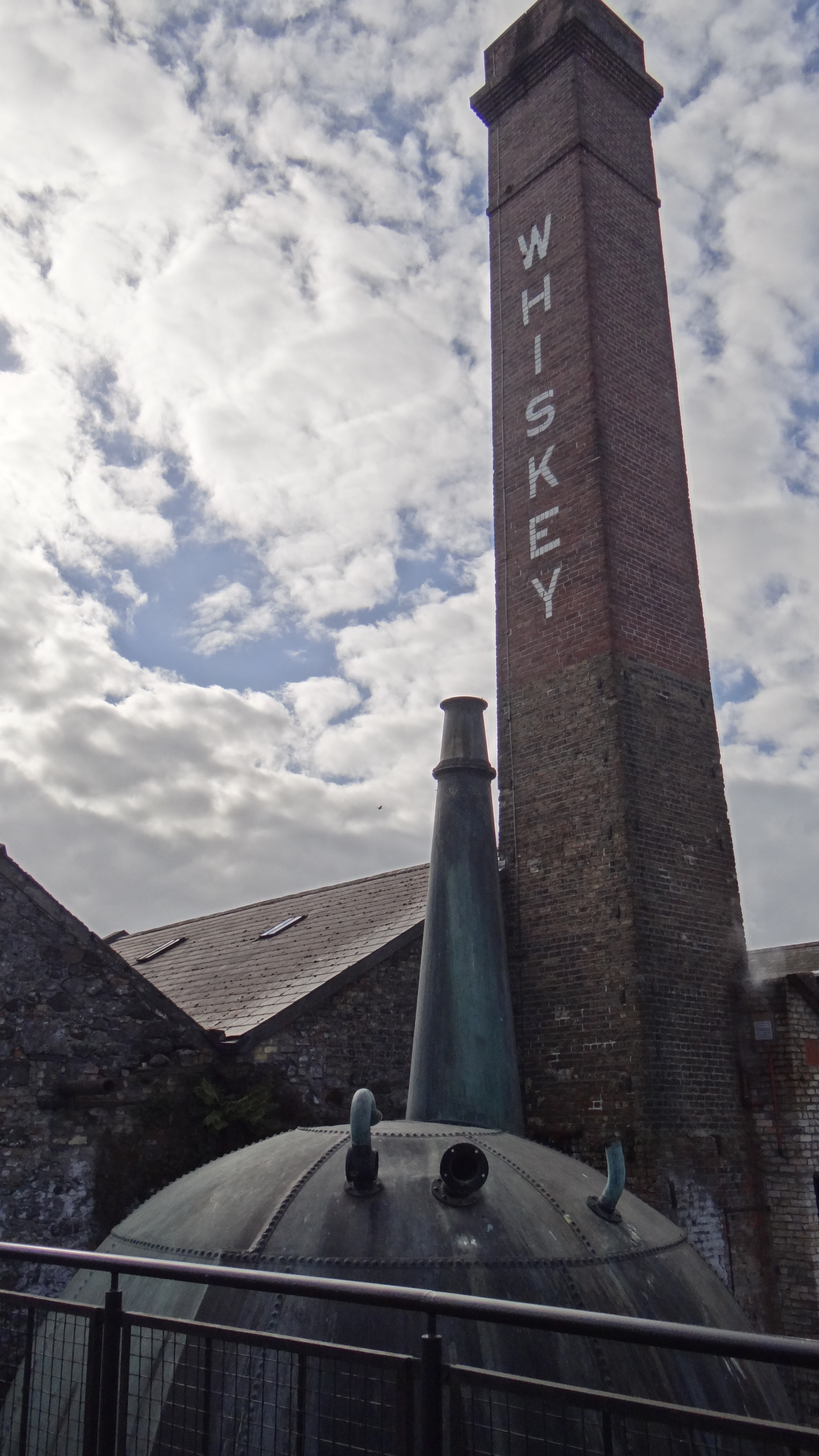 Distillerie de Kilebeggan